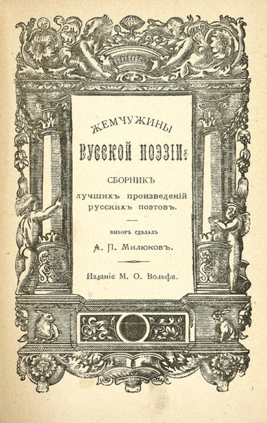 Жемчужины русской поэзии. Сборник лучших произведений русских поэтов / выбор сделал А.П. Милюков. СПб.: Издание М.О. Вольф, 1874.